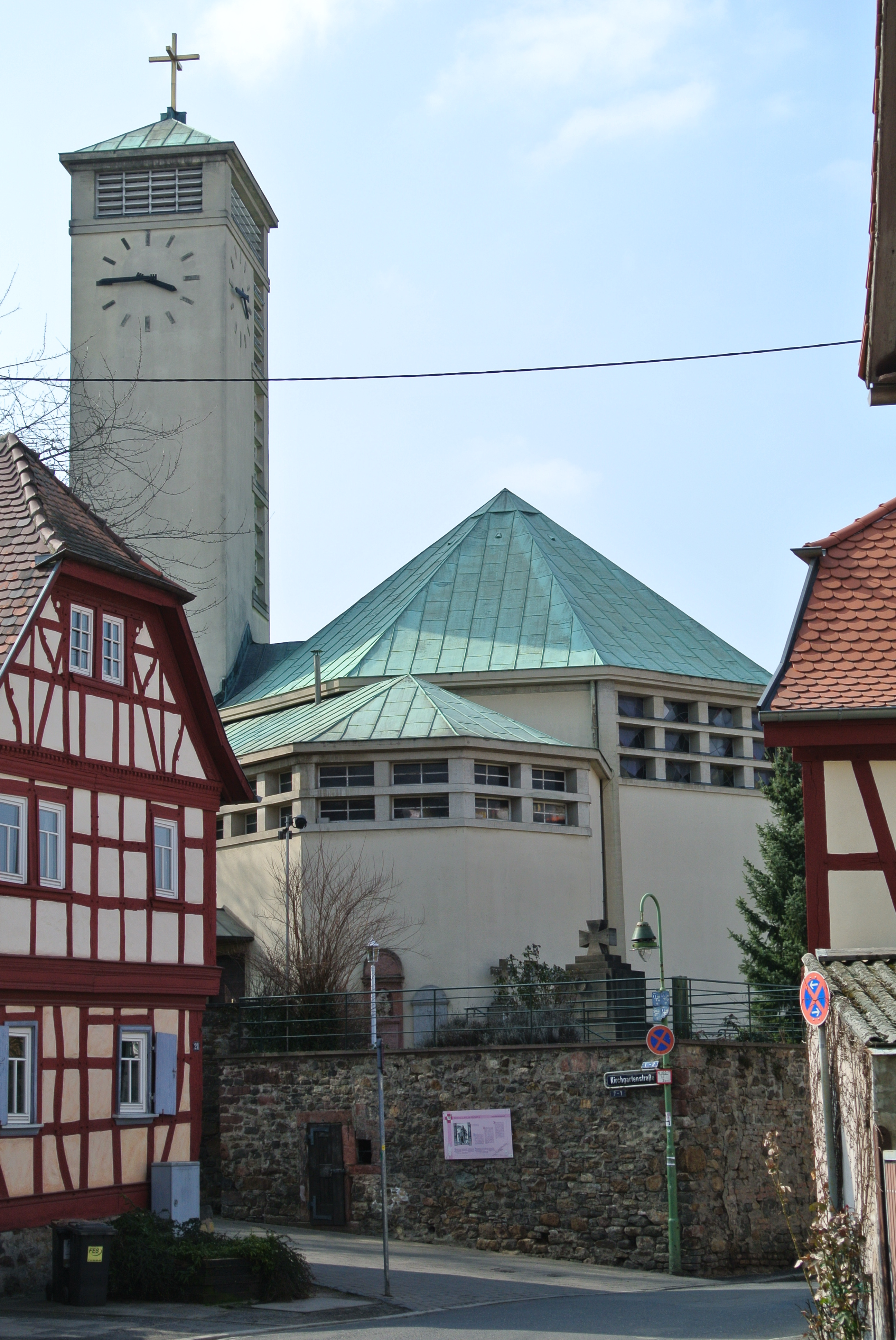 Evangelische Gustav-Adolf-Kirche in Frankfurt-Niederursel des Architekten Martin Elsässer aus den 1920er Jahren